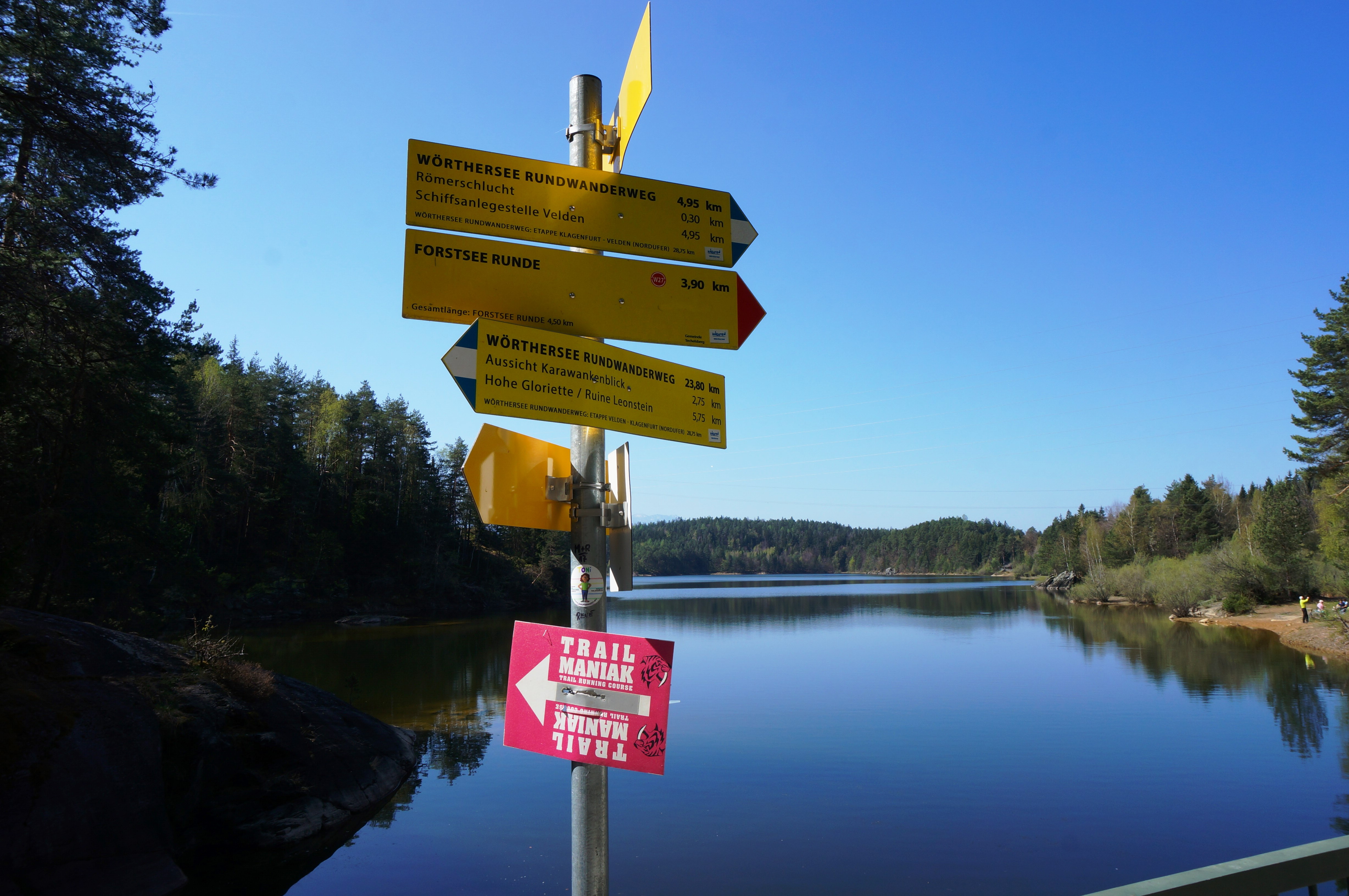 entlang des Wörthersee Rundwanderweges ist die Etappe "Forstsee" zwischen Pörtschach und Velden in der Gemeinde Techelsberg.